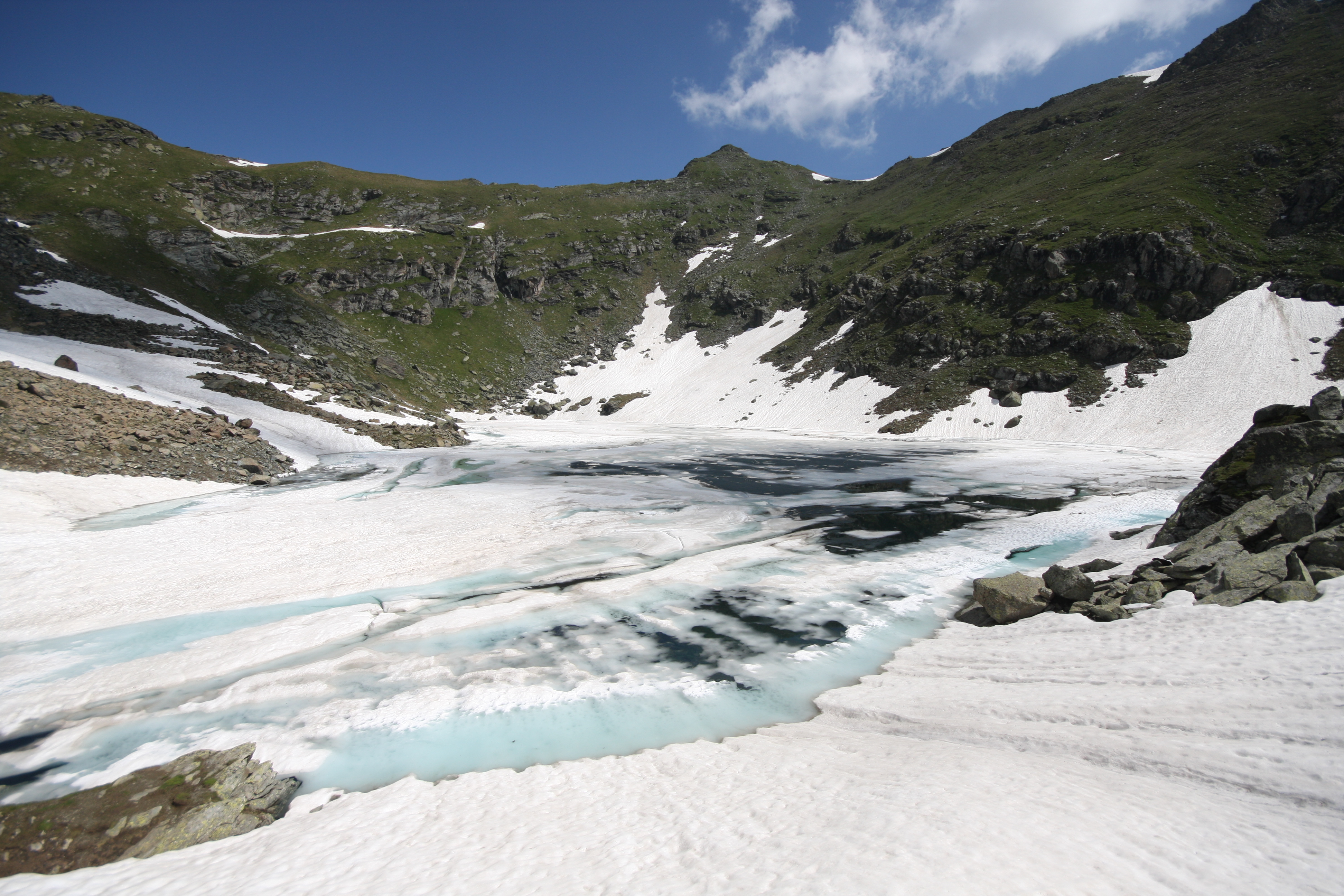 parco naturale Orsiera-Rocciavrè (Q2052054)